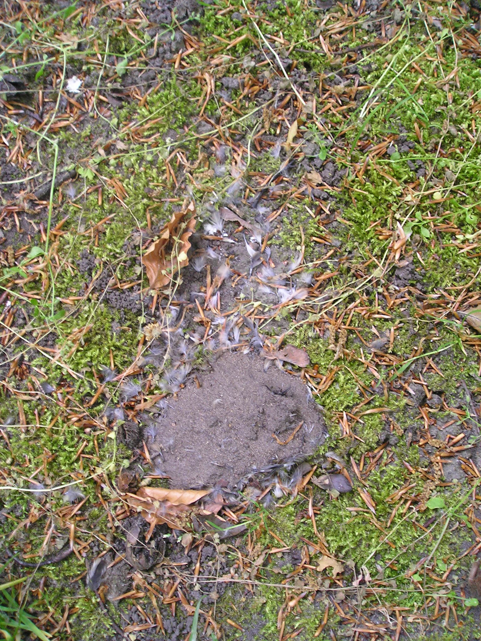 von einem Totengräber (Nicrophorus sp.) vergrabener nestjunger Kernbeißer in einem Park in Berlin.